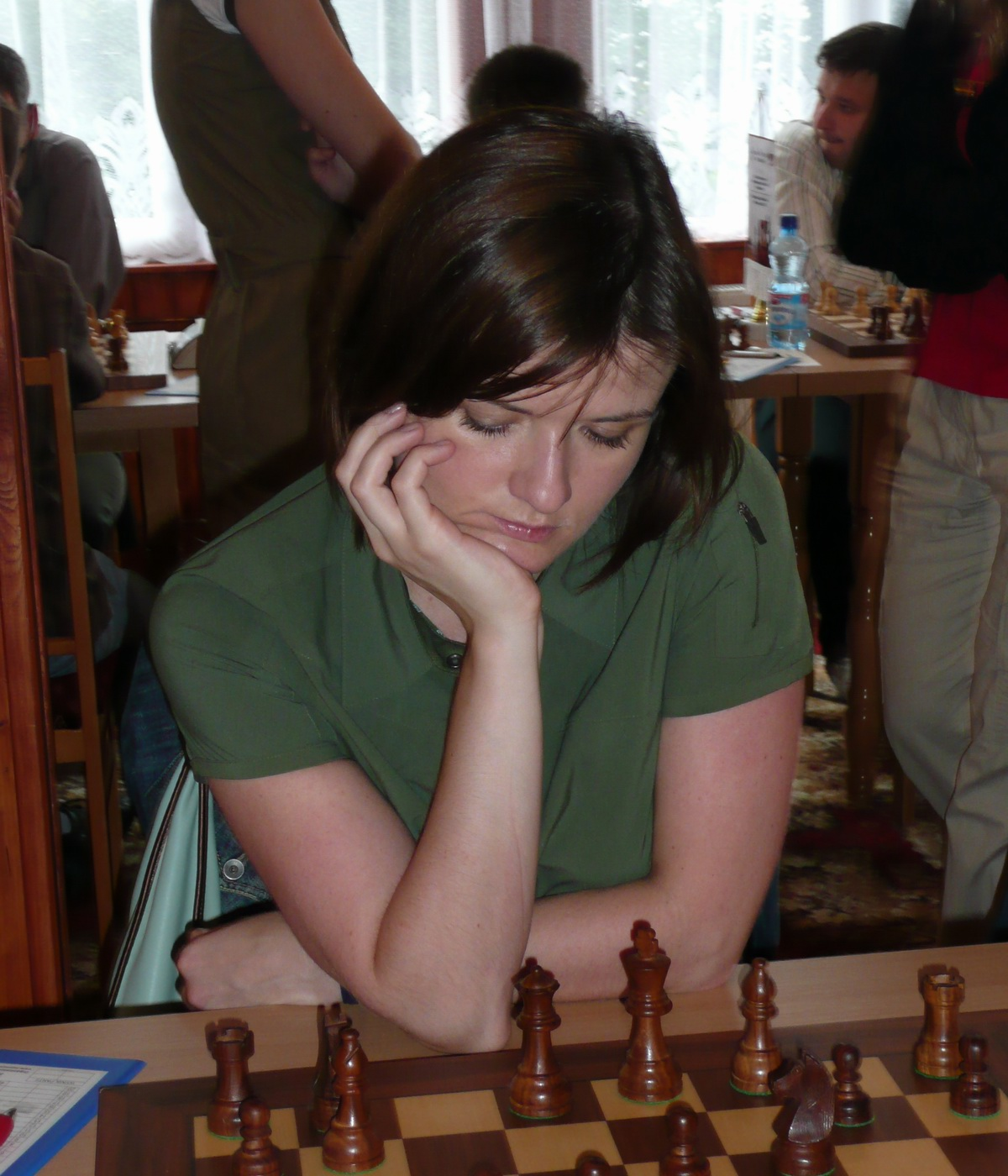 WGM Monika Krupa, Karpacz 2008